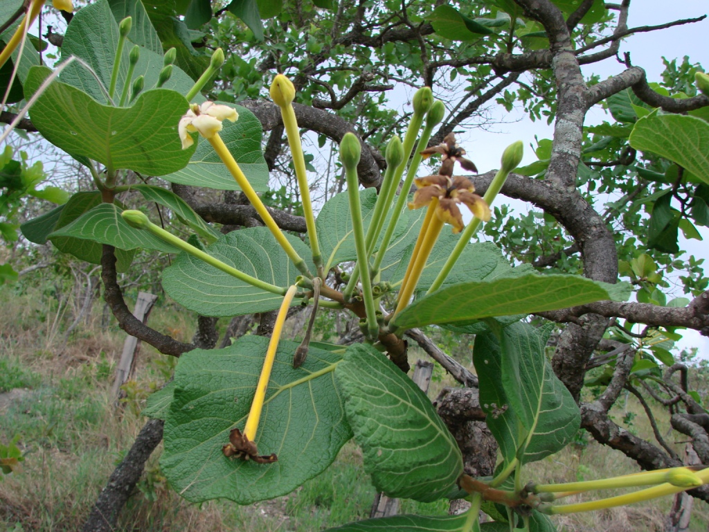 Tocoyena formosa - RUBIACEAE Parque Estadual da Serra dos Pirineus - Pirenópolis - Goiás - Brasil